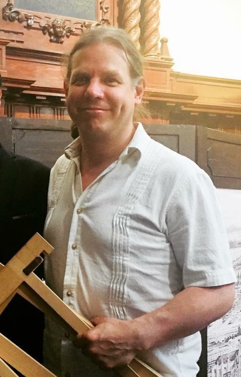 Miguel Cicero